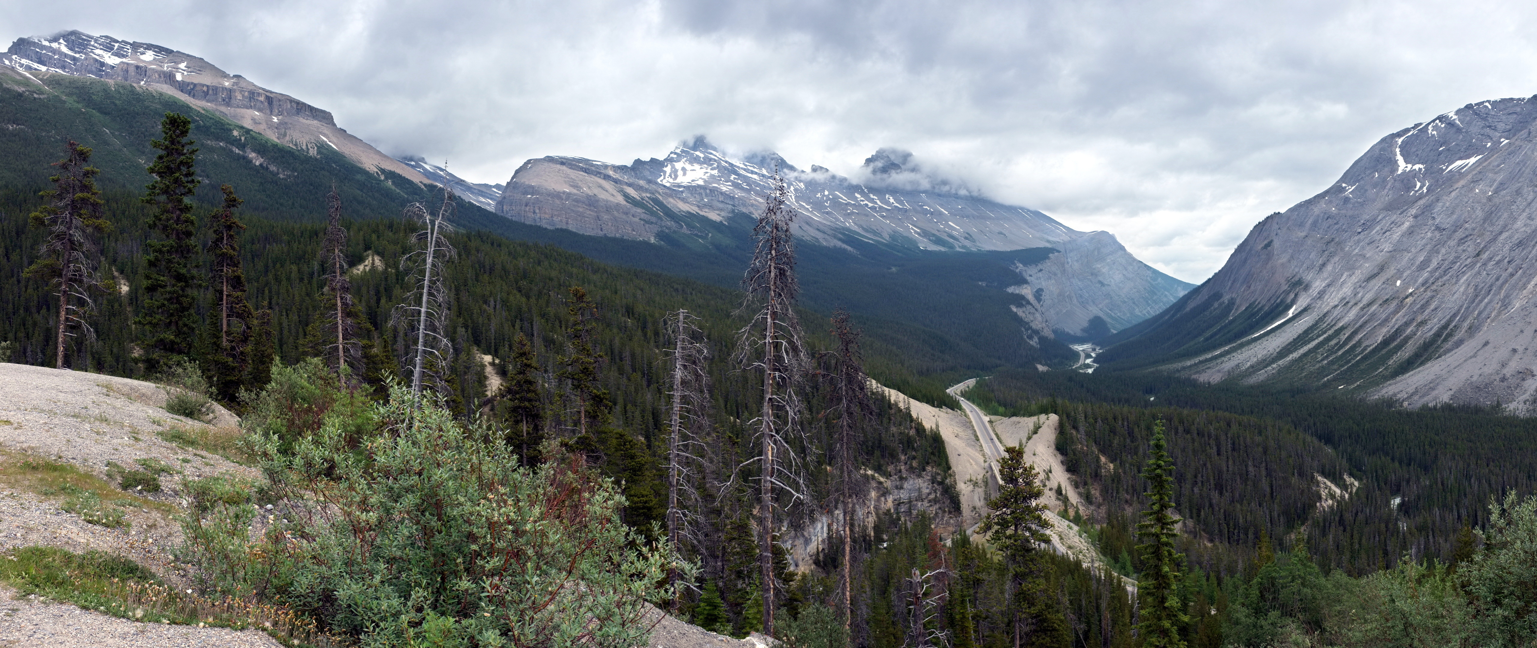 Sunwapta Pass